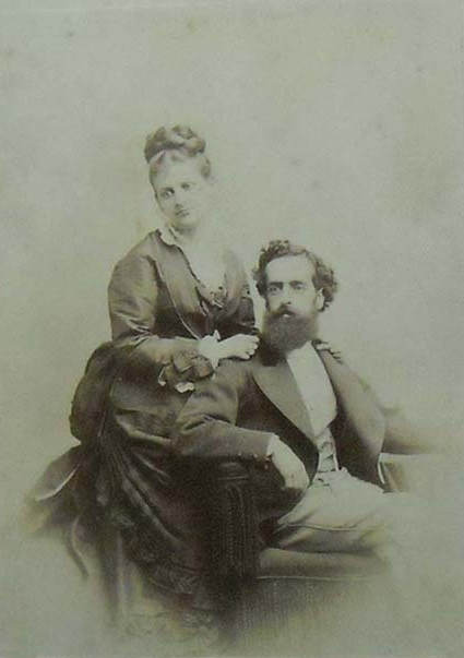 Retrato de José Pedro Varela (1845 - 1879, sociólogo, periodista y político uruguayo) junto a su esposa Adela Acevedo.